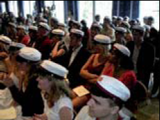 Studenter